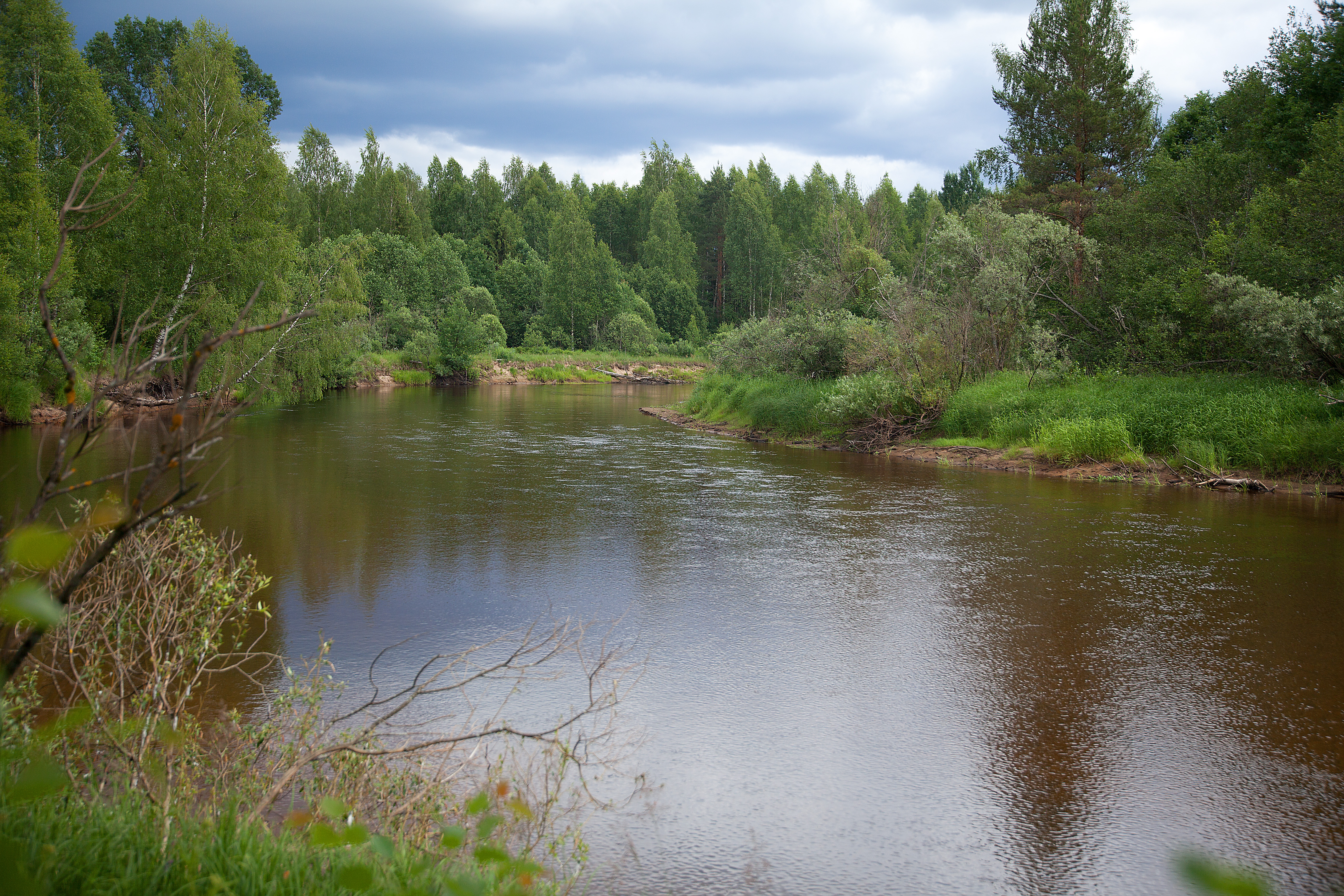 Шлина